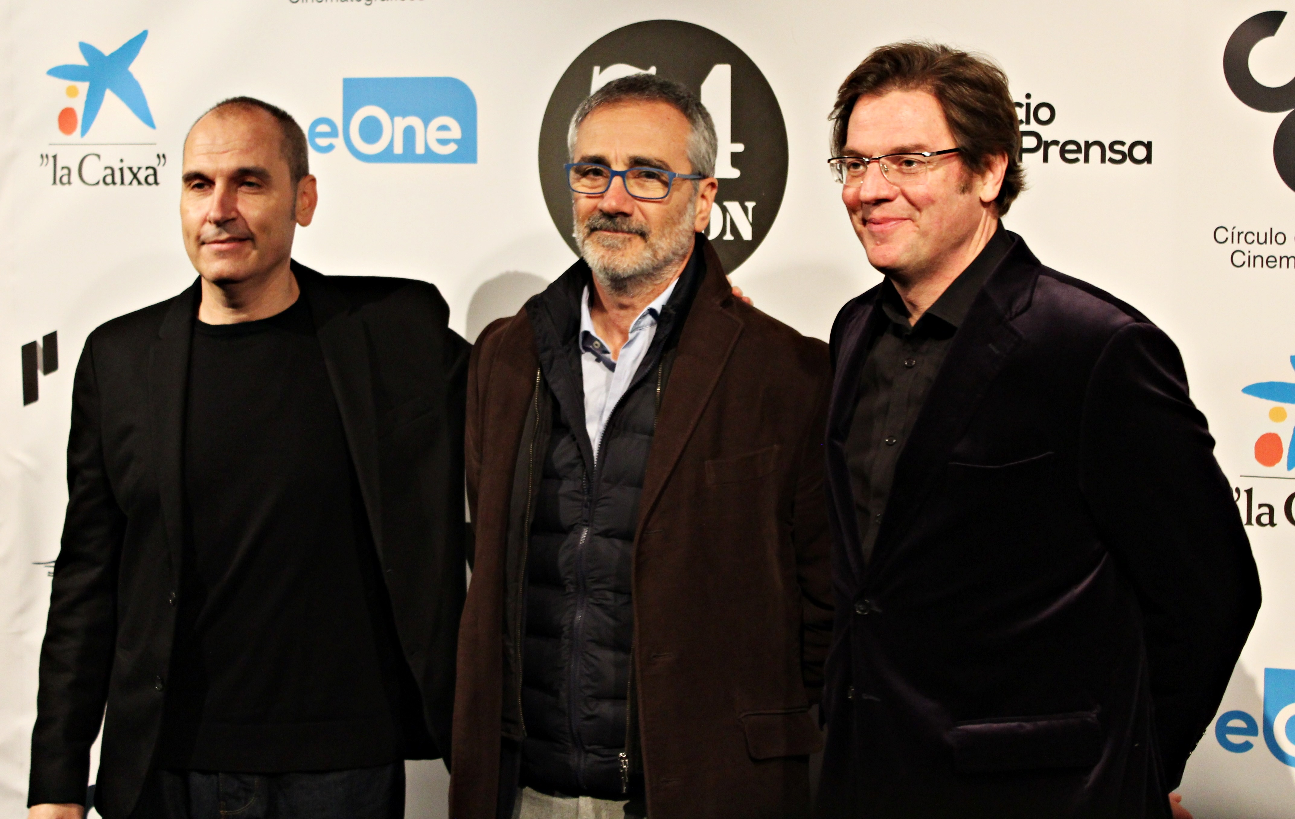 El guionista David Marqués; el director, guionista y montador Javier Fesser y el productor Álvaro Longoria en la 74 edición de las Medallas del Círculo de Escritores Cinematográficos en la que estaban nominados por los mencionados trabajos en la película Campeones.